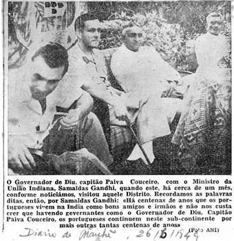 Visita a Diu de Samaldas Ghandi